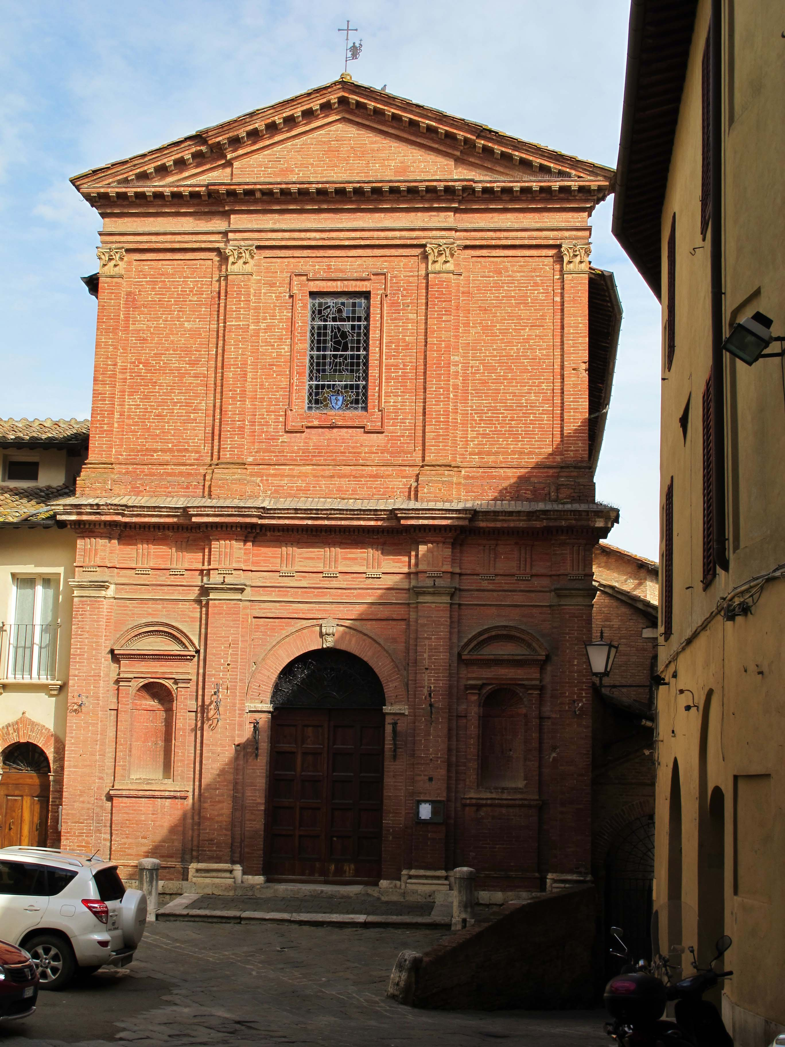 Siena